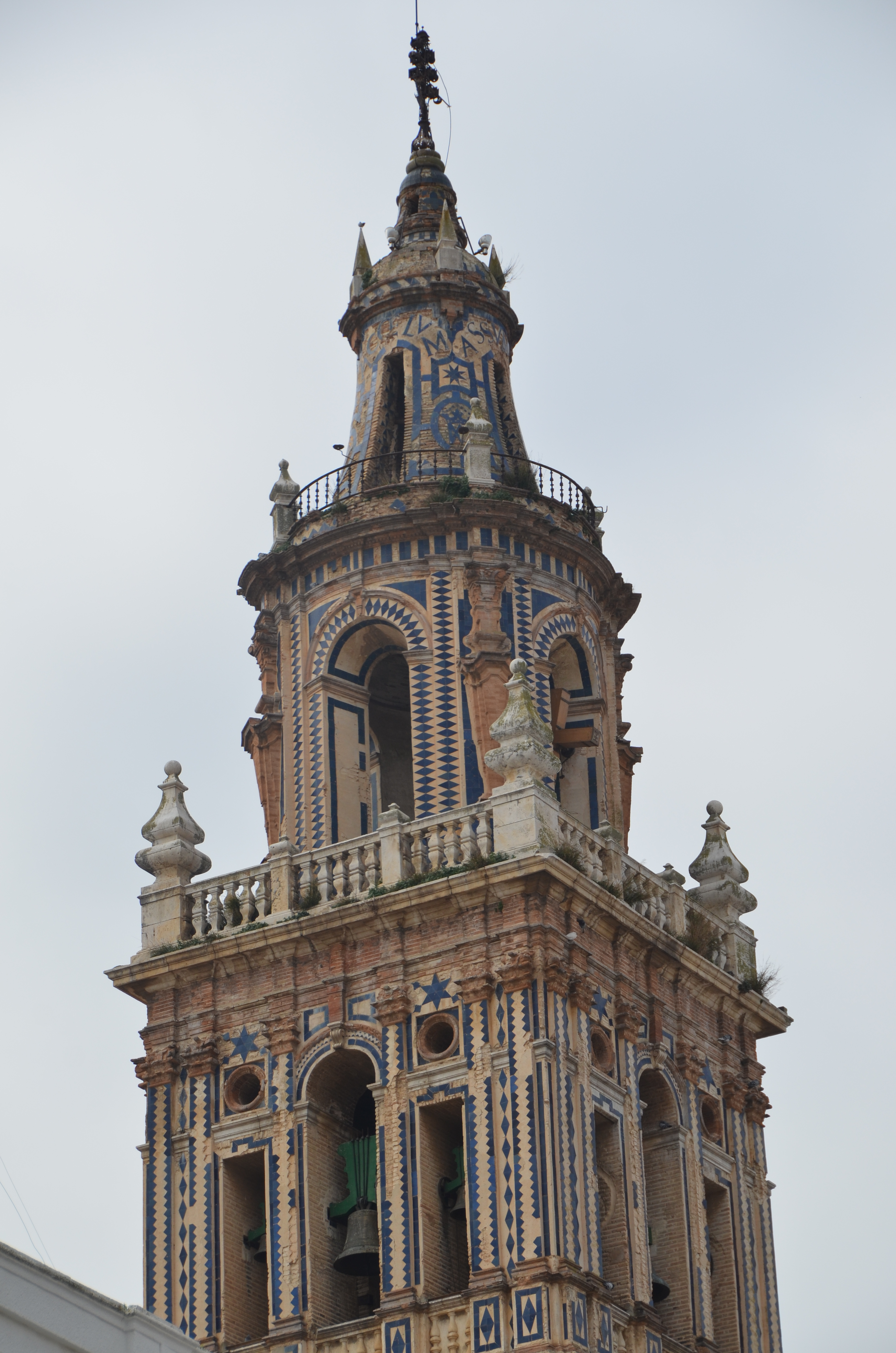 Écija, Iglesia de Sta María Ntra. Señora Écija